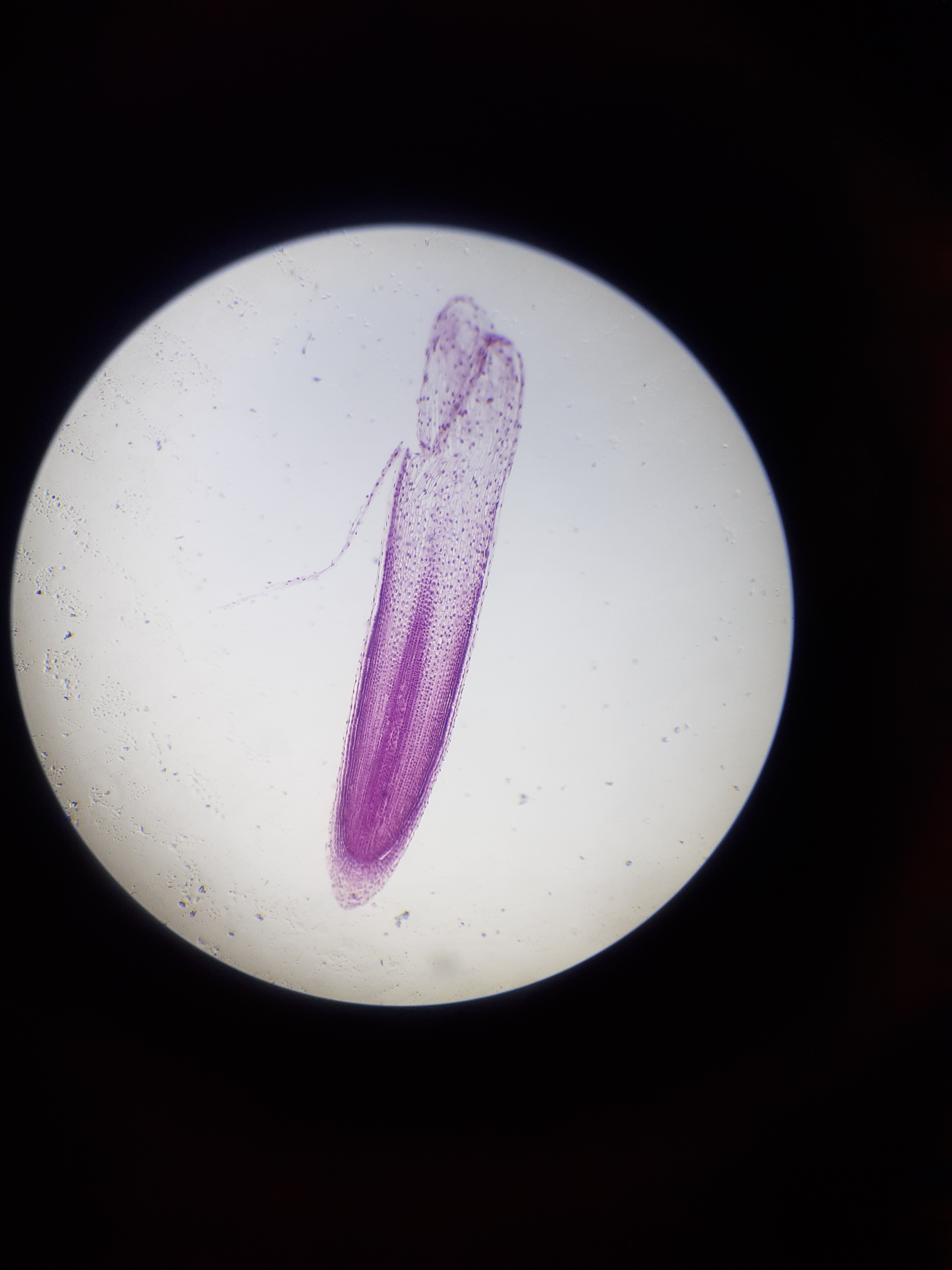 Mitosis ialah pembahagian sel dalam benda hidup untuk menambahkan bilangan sel.